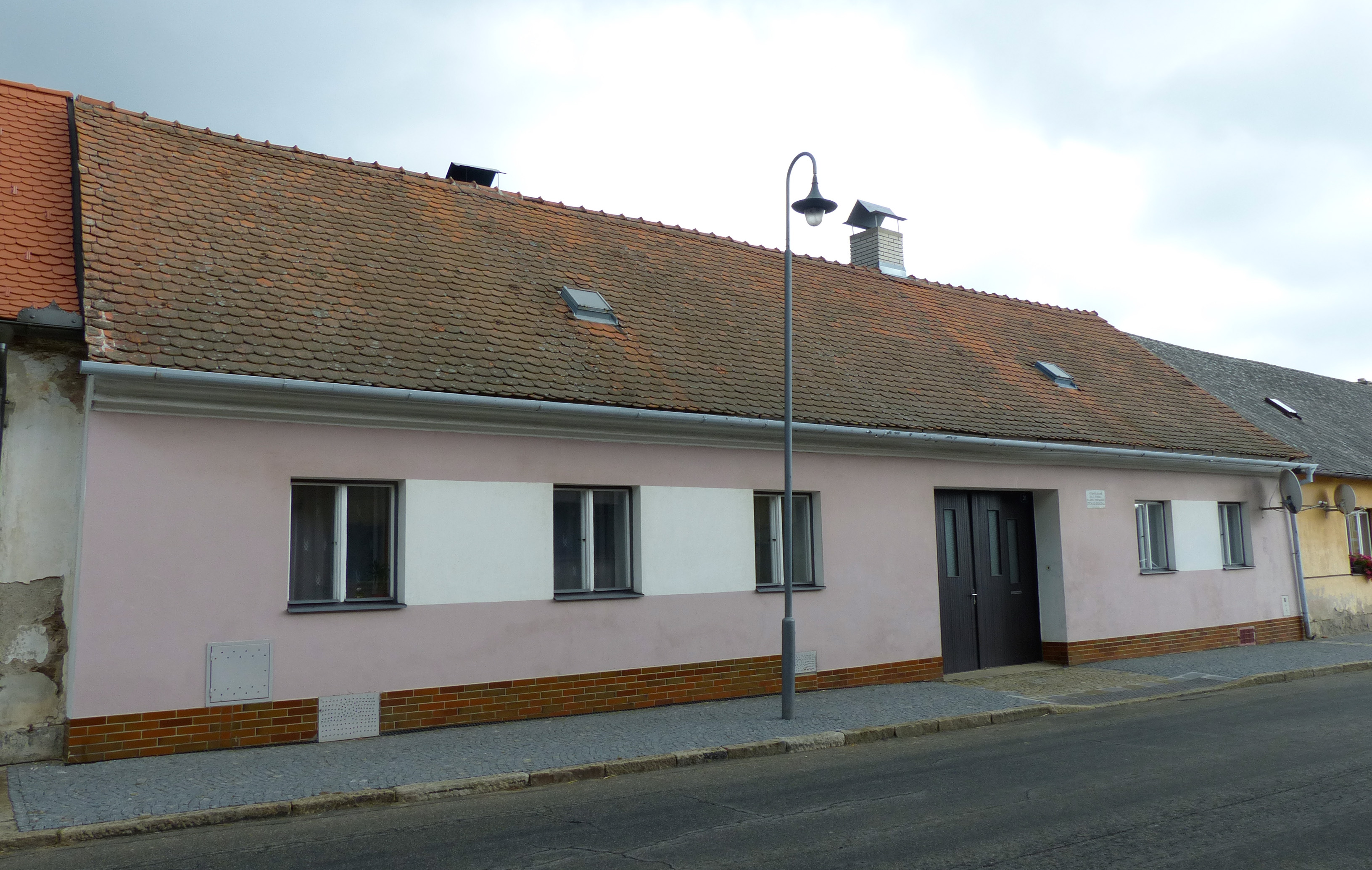 Dům čp. 31, Březinova 31, Nová Říše. Dům, ve kterém žil Otokar Březina.